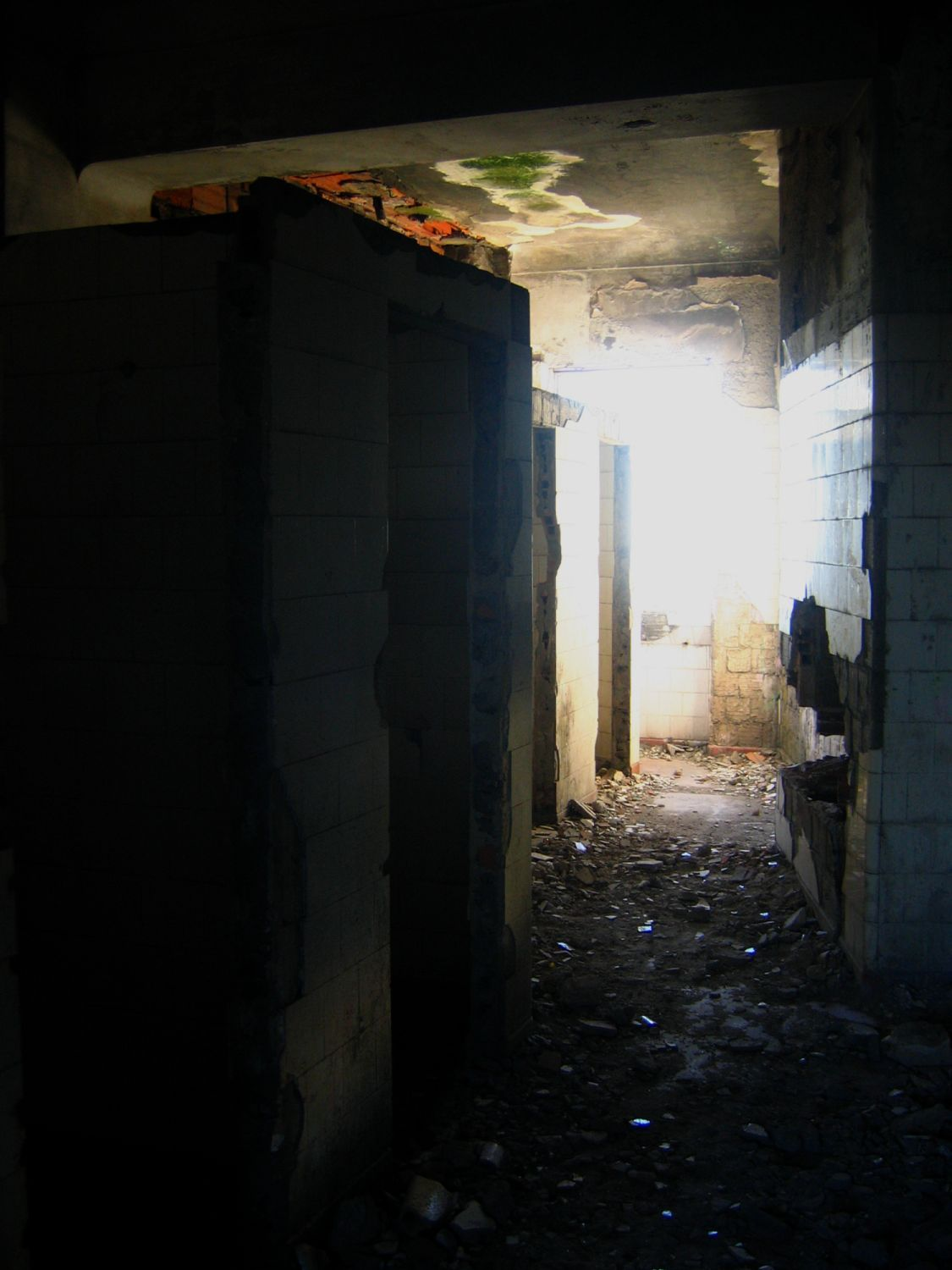 Desolation